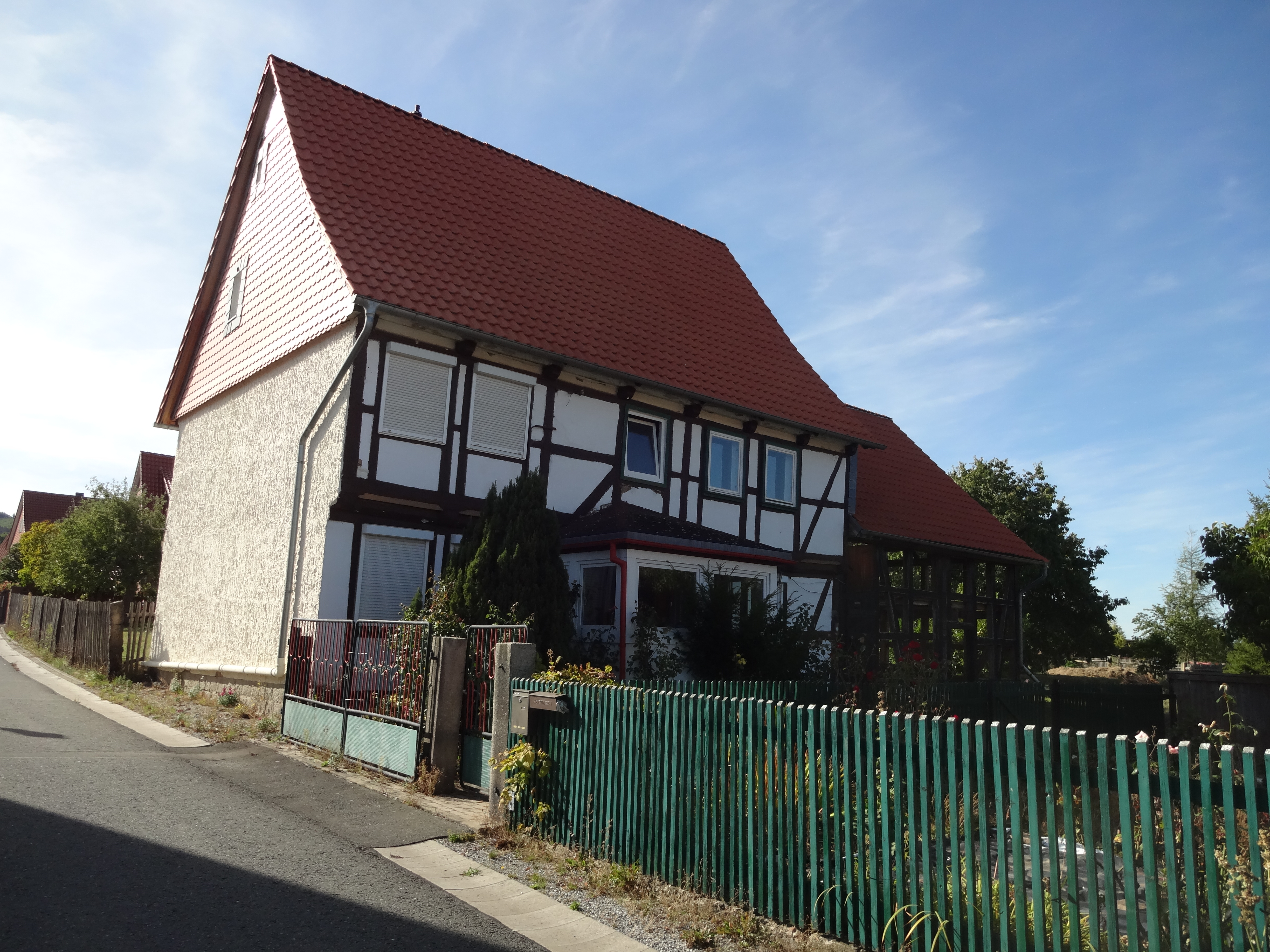 denkmalgeschützter Bauernhof in der Schmiedestraße 10 in Drübeck